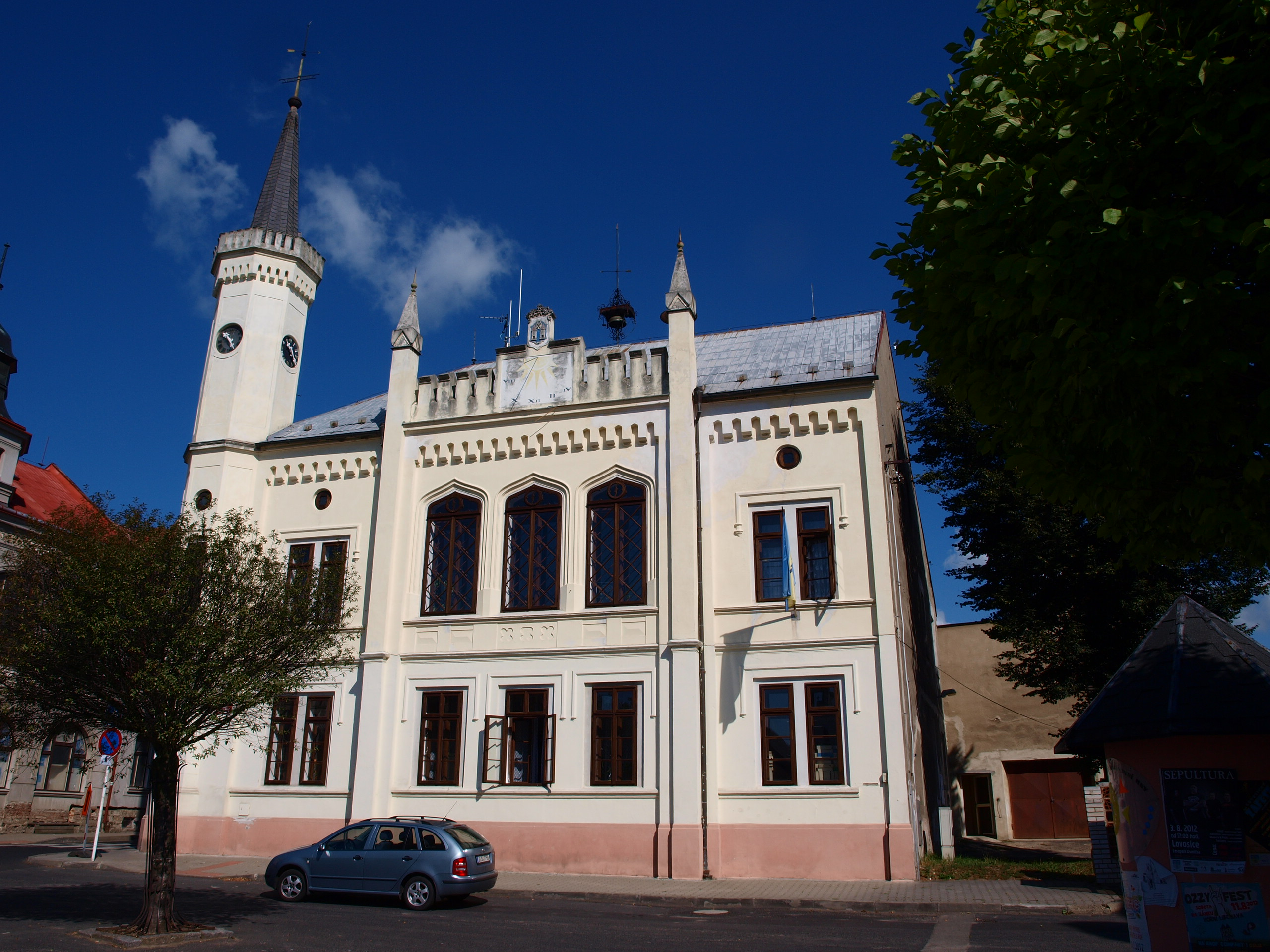 Zákupy - radnice